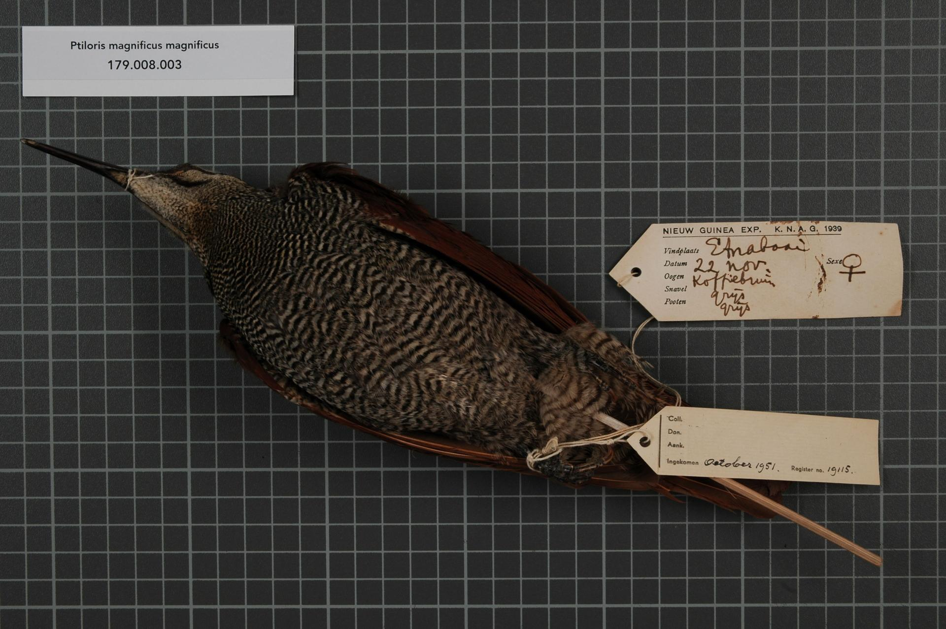 Ptiloris magnificus magnificus (Vieillot, 1819)